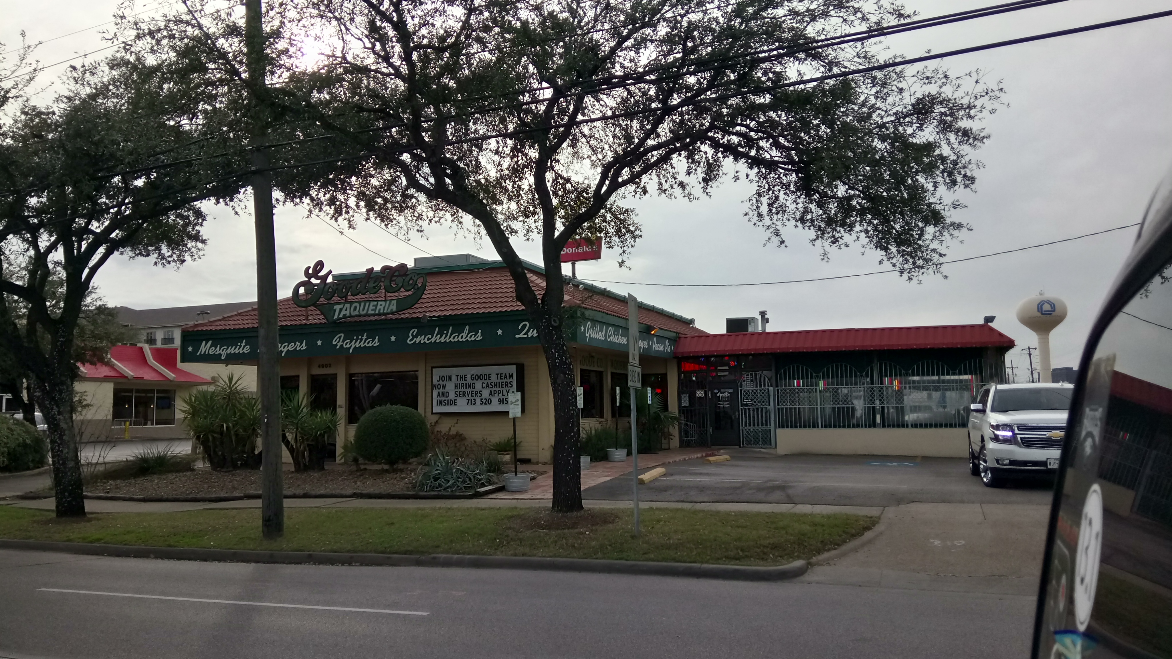 Goode Company Taqueria